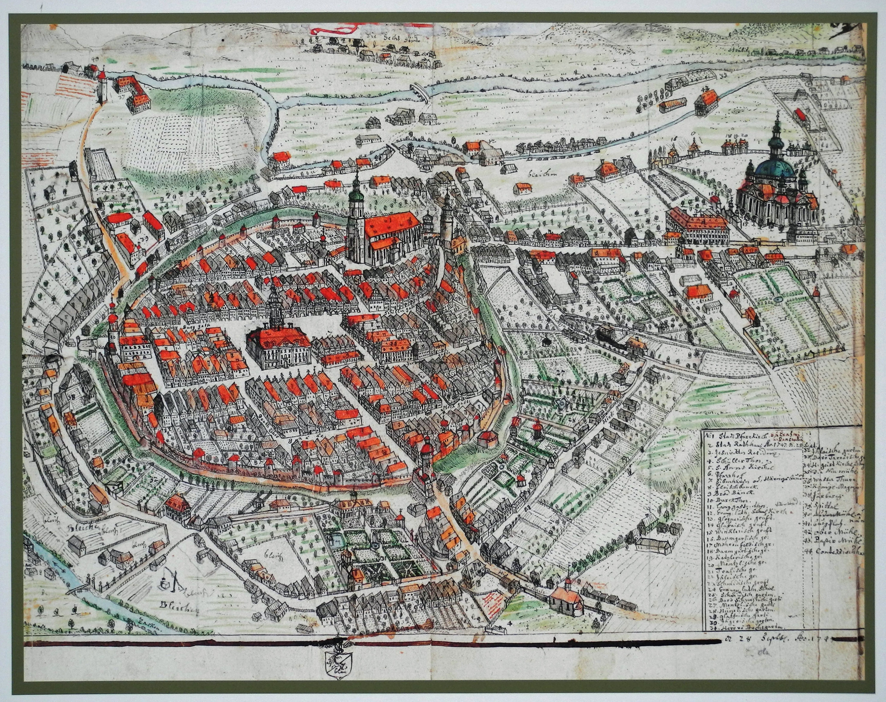 Ansicht der Stadt Hirschberg im Riesengebirge, jetzt Jelenia Góra in Polen, von Friedrich Bernhard Werner (1690–1776)